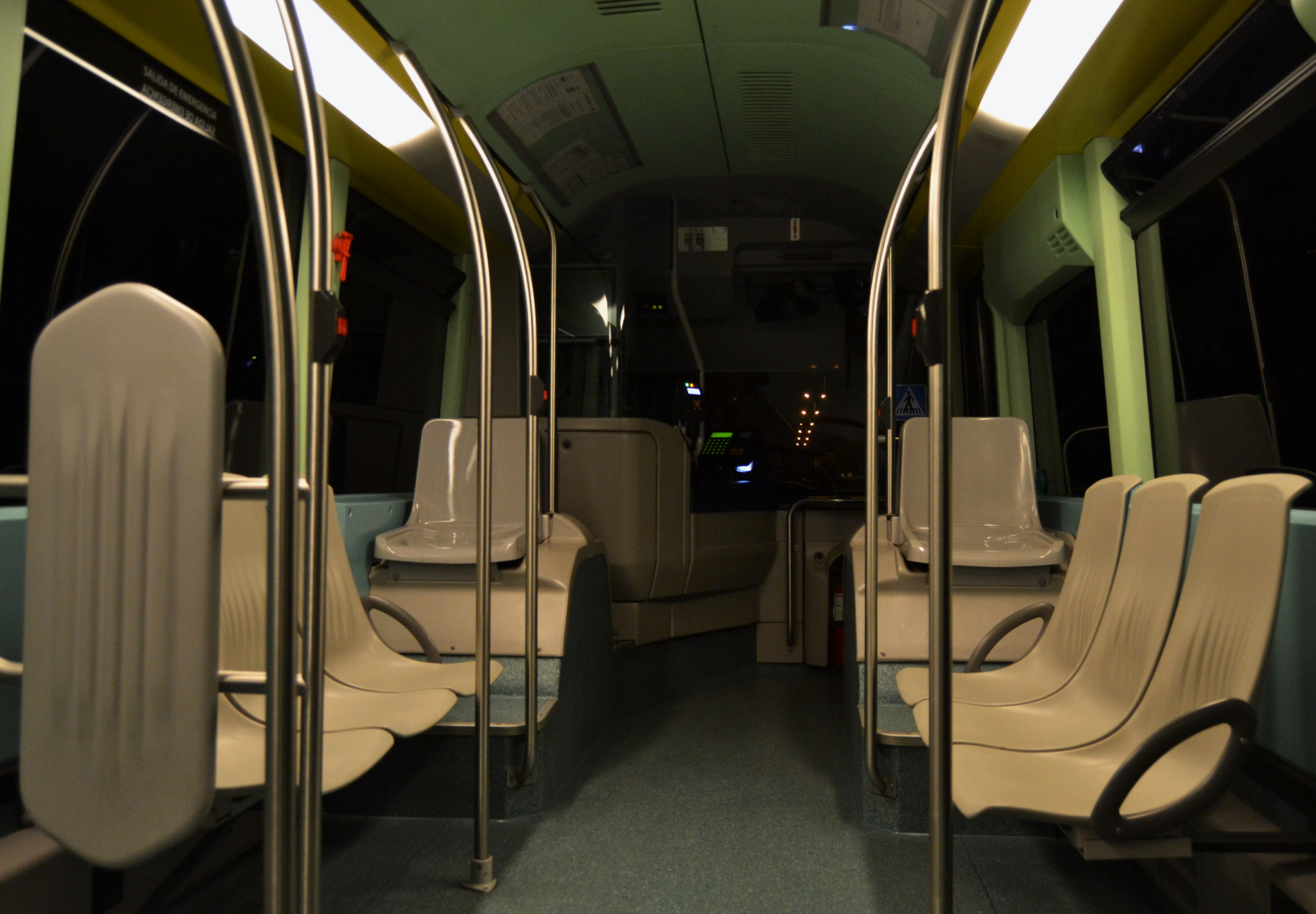 Interior d'un troleibús de Castelló.